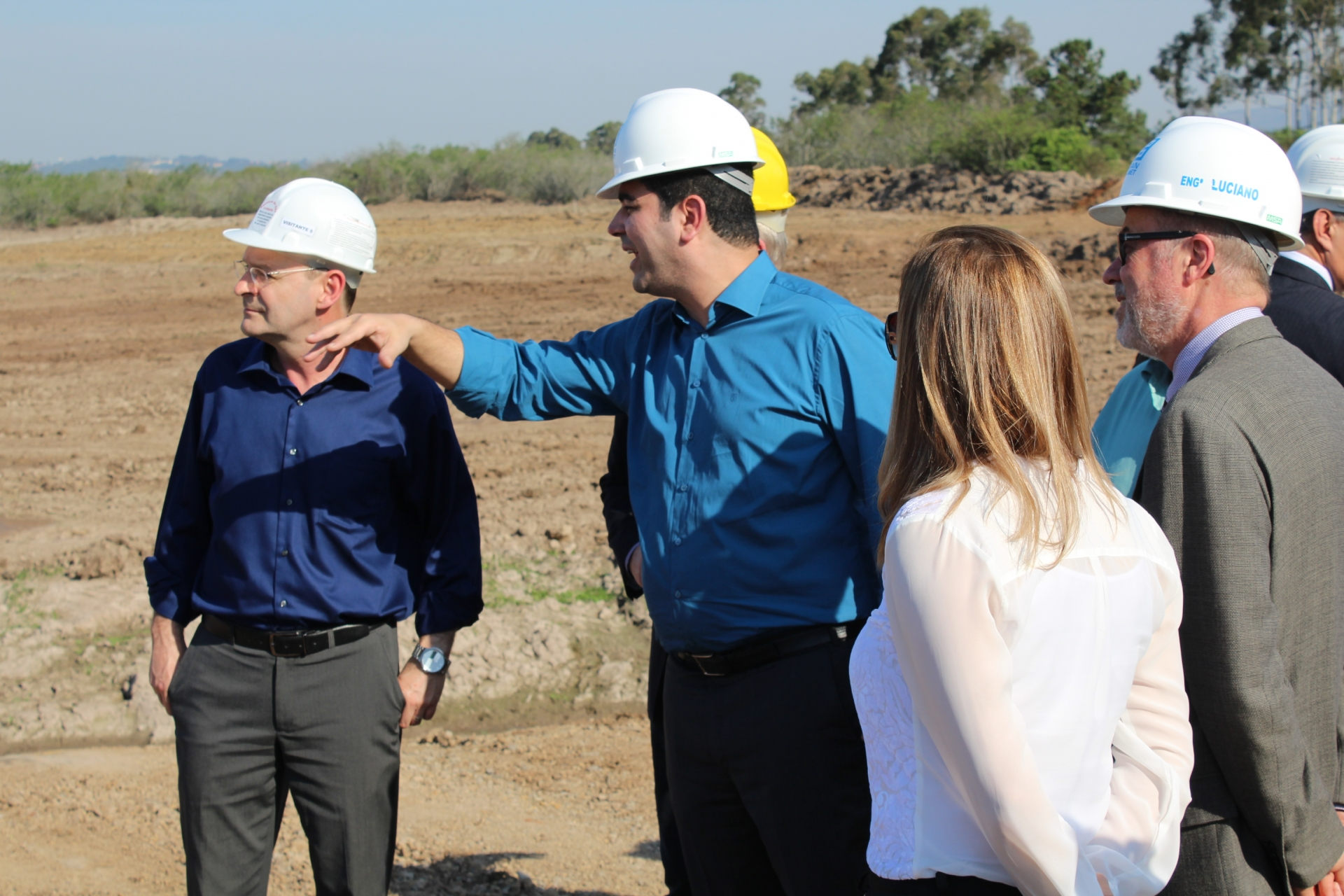 obras